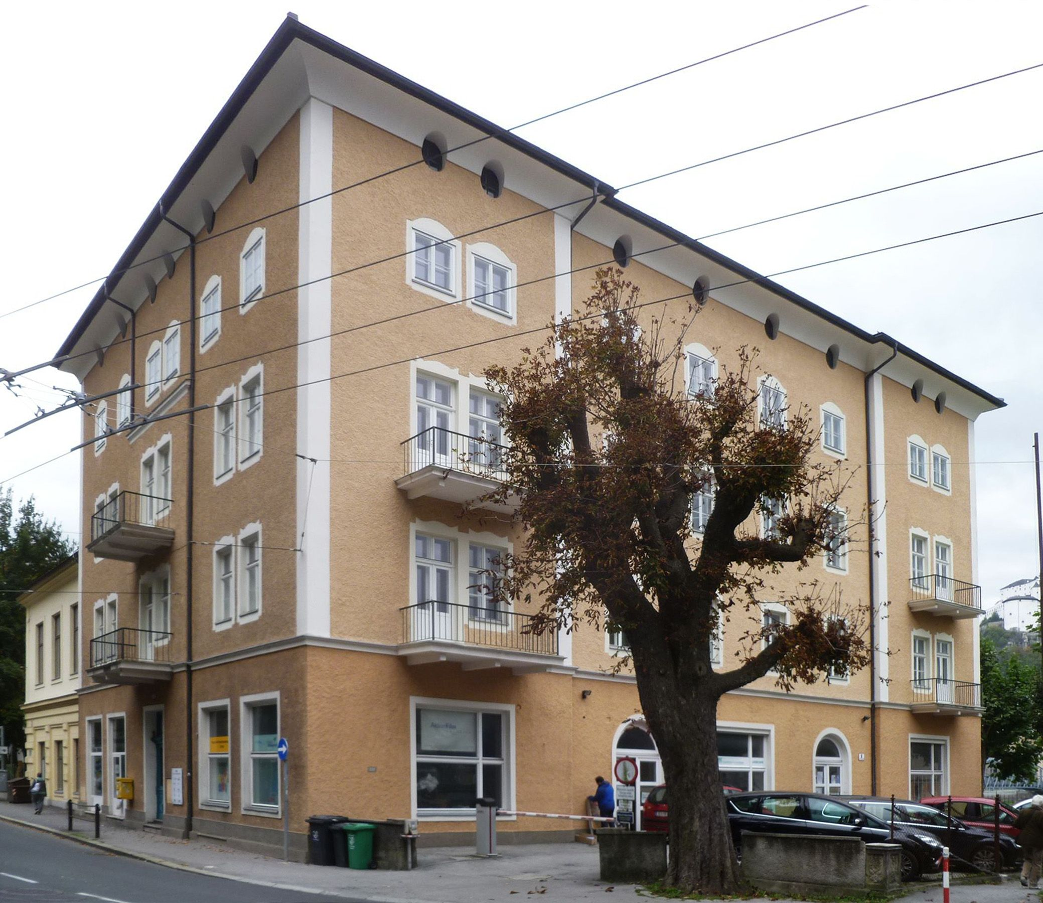 Cafe Corso in Salzburg von der Imbergstasse aus